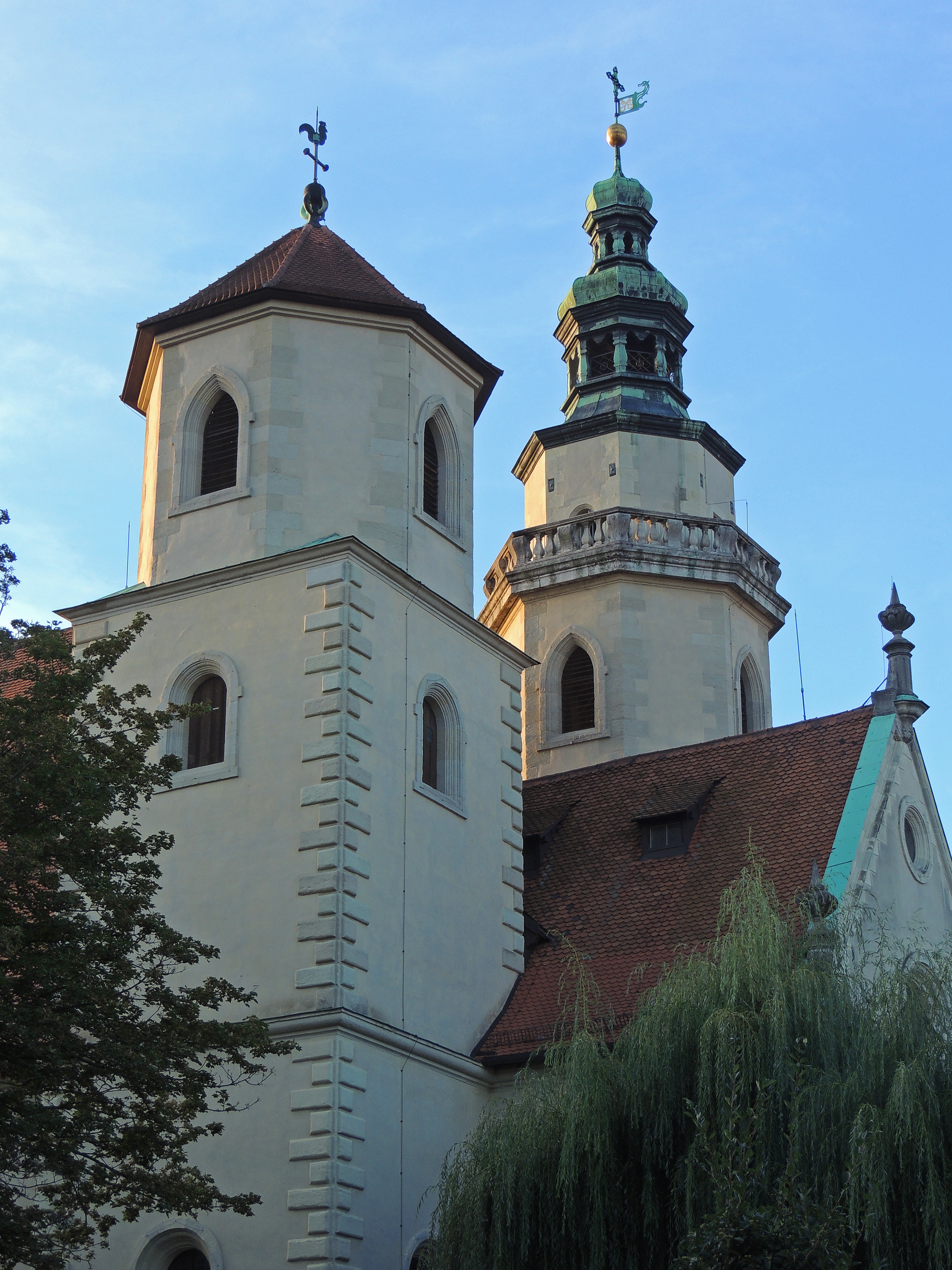 Die Evangelisch-Lutherische Dreieinigkeitskirche wurde 1627-31 von erbaut. Sie ist eine der ersten evangelisch-lutherischen Kirchenneubauten in Bayern.This is a photograph of an architectural monument.